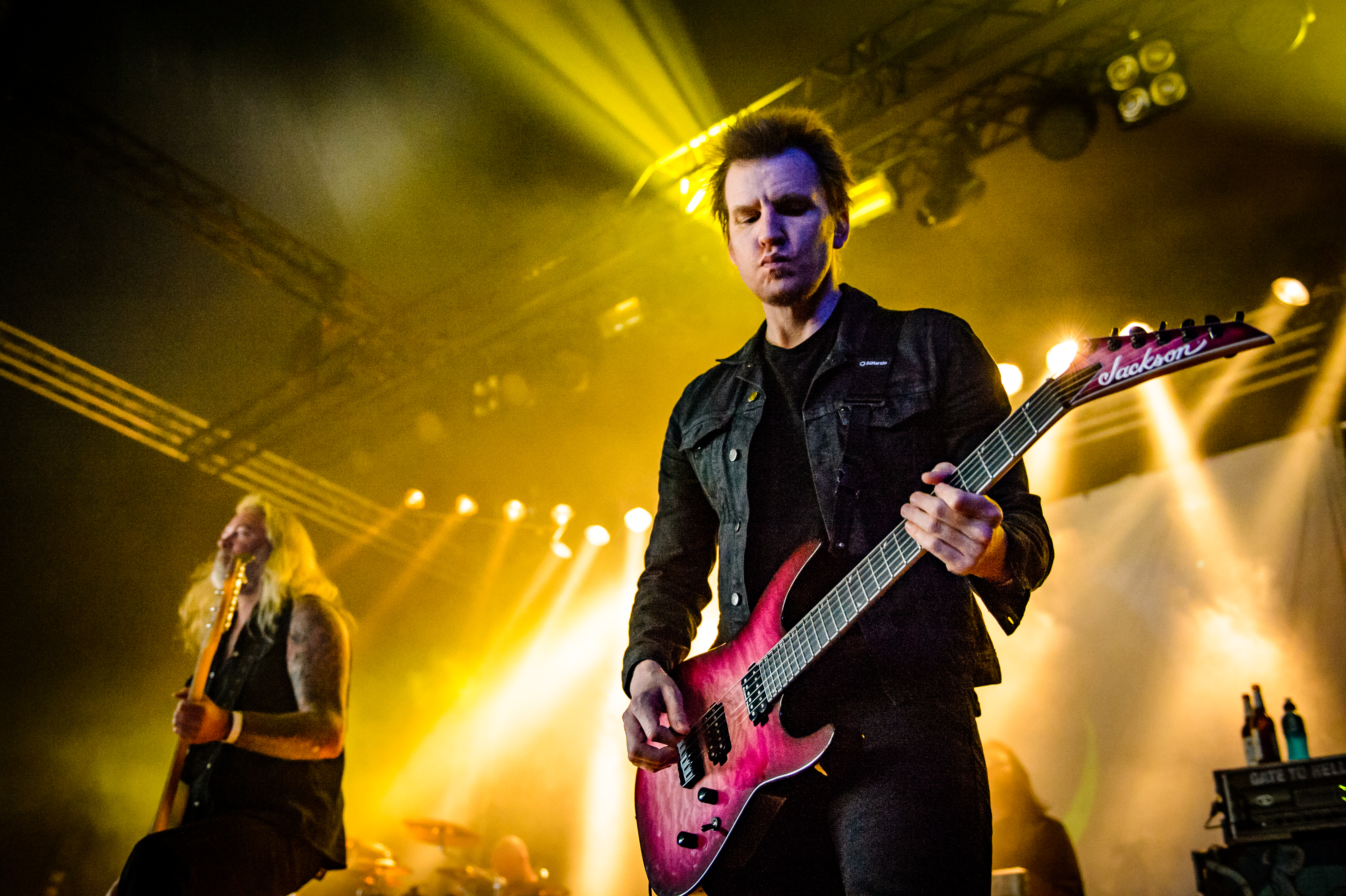 'Dong Open Air 2017; Neukirchen-Vluyn': 'Dark Tranquillity'